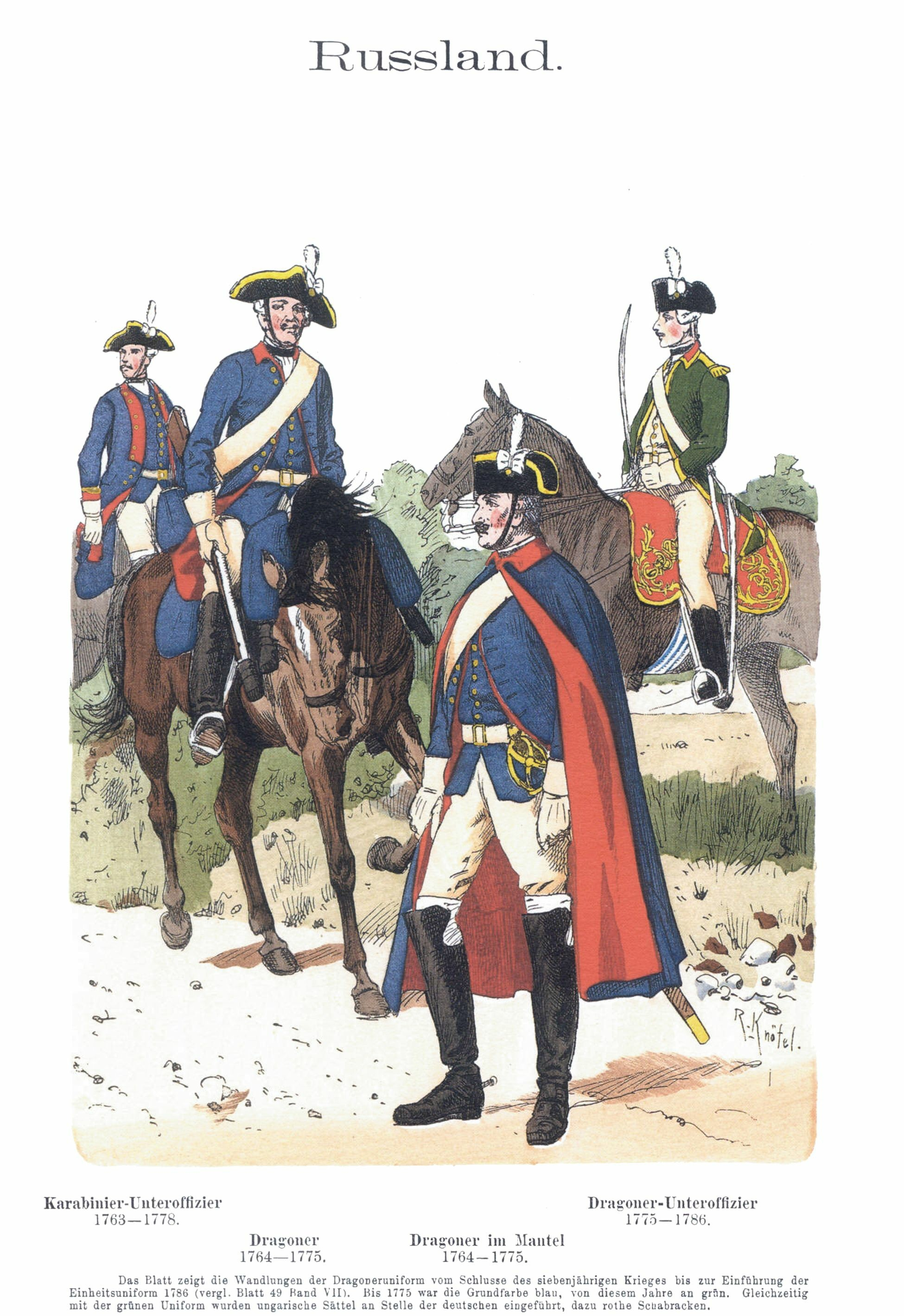 Иллюстрация Рихарда Кнотеля